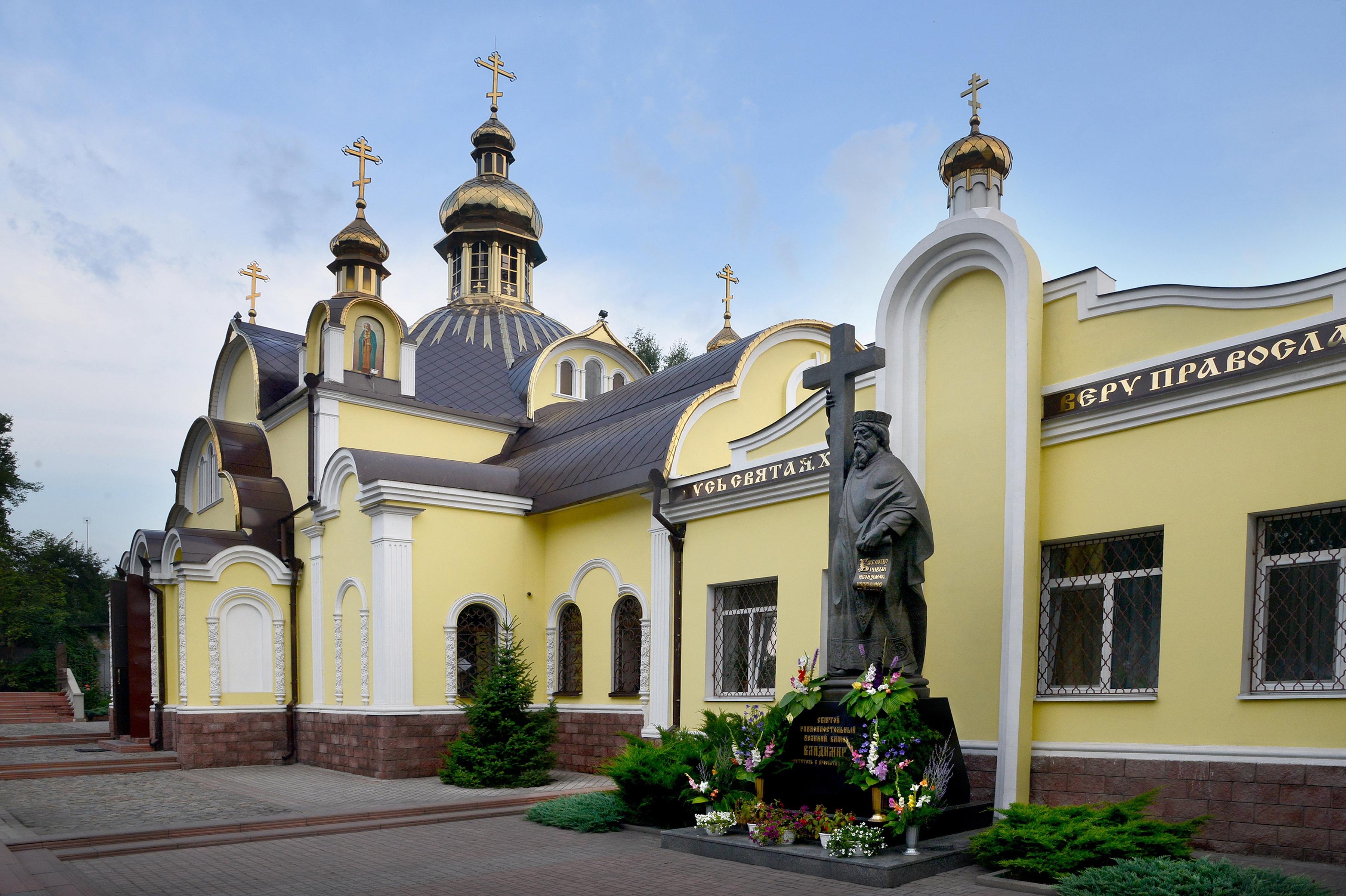 ХРАМ СВЯТОГО РАВНОАПОСТОЛЬНОГО ВЕЛИКОГО КНЯЗЯ ВЛАДИМИРА (Украина,Днепропетровск)